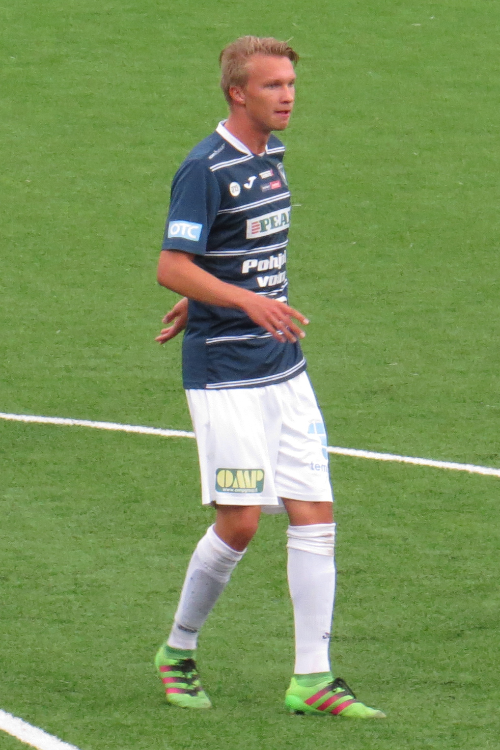 Akseli Kalermo, suomalainen jalkapalloilija AC Oulun joukkueessa kaudella 2016.